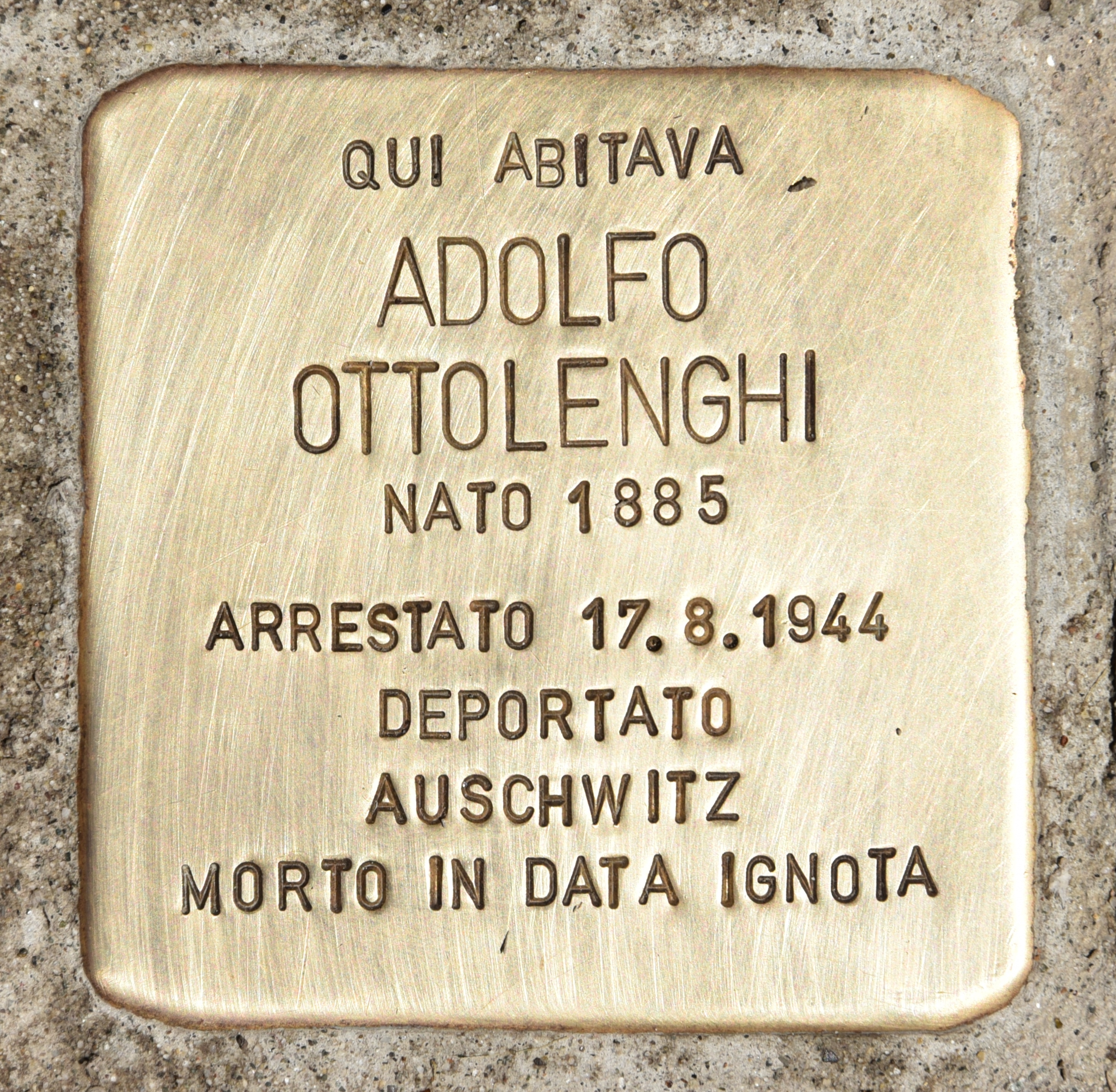 Stolperstein für Adolfo Ottolenghi, Rio Terà de la Madalena 2346/B